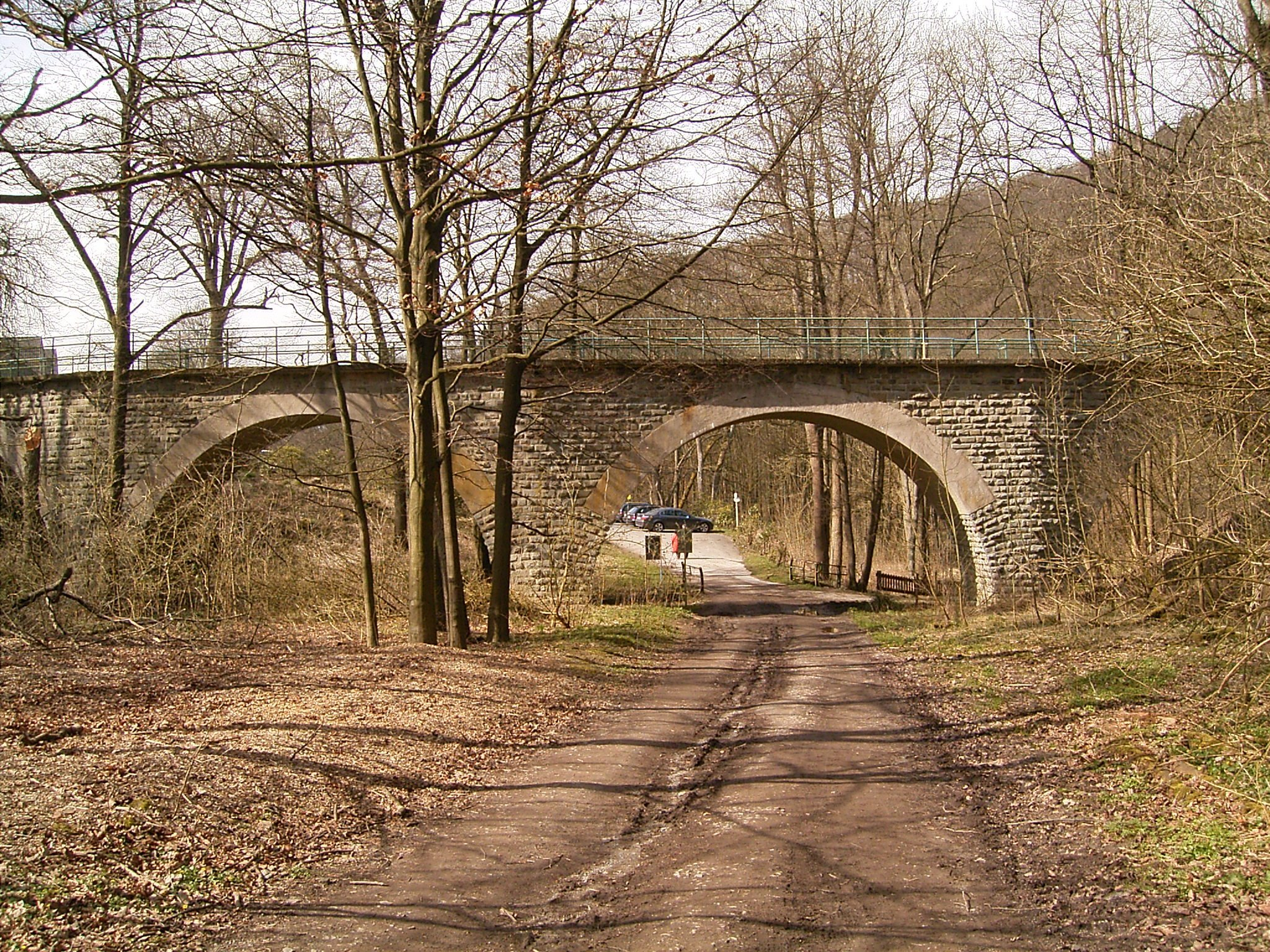 Viadukt Plessen der ehemaligen Kleinbahntrasse Haspe-Vörde-Breckerfeld in Hagen-Haspe